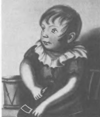 Сын Хитинга Фриц, ставший героем сказки «Щелкунчик и Мышиный король». Акварель Гофмана. 1815 г.